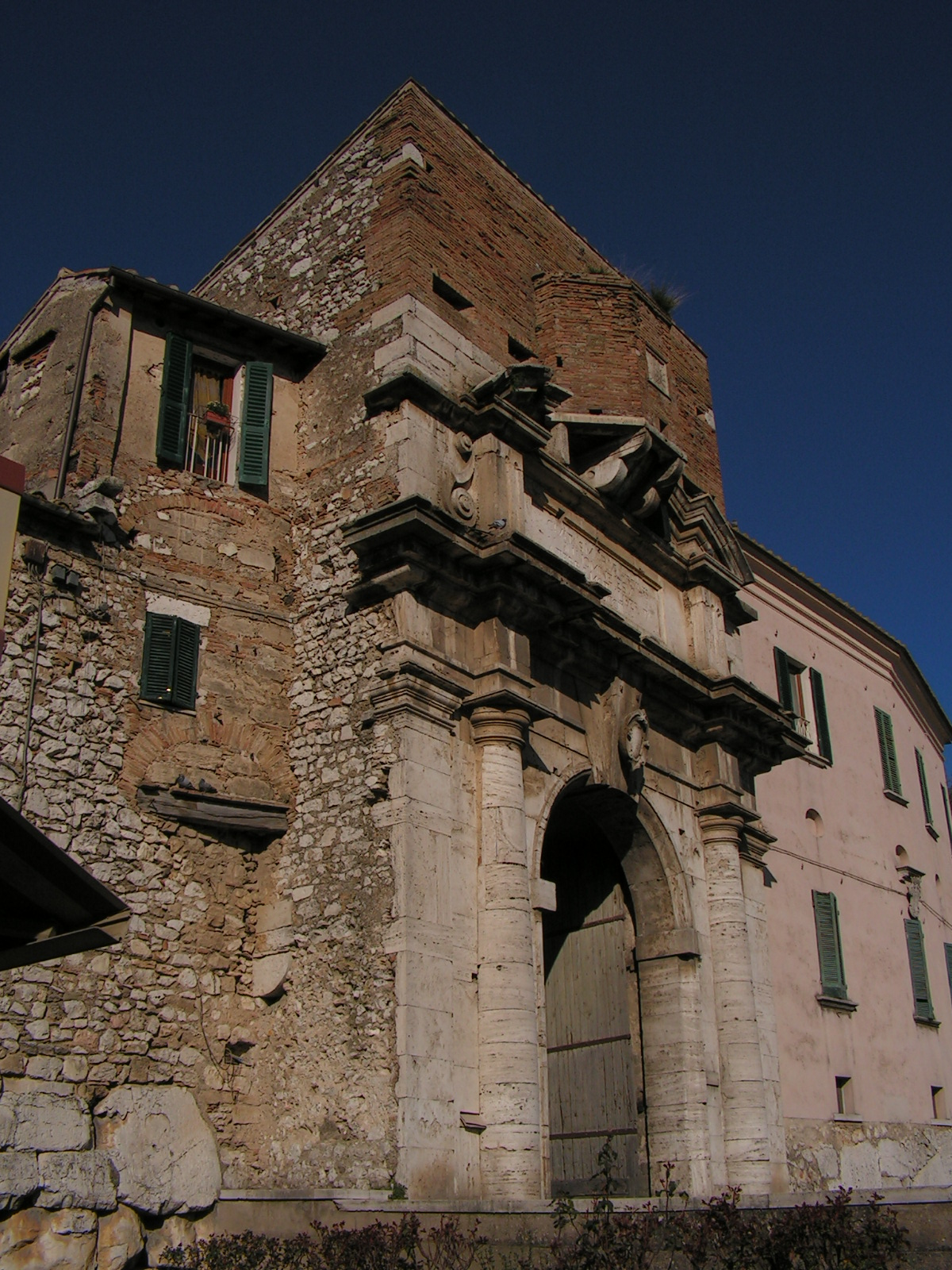 R.Passagrilli Amelia - Porta Romana o Busolina